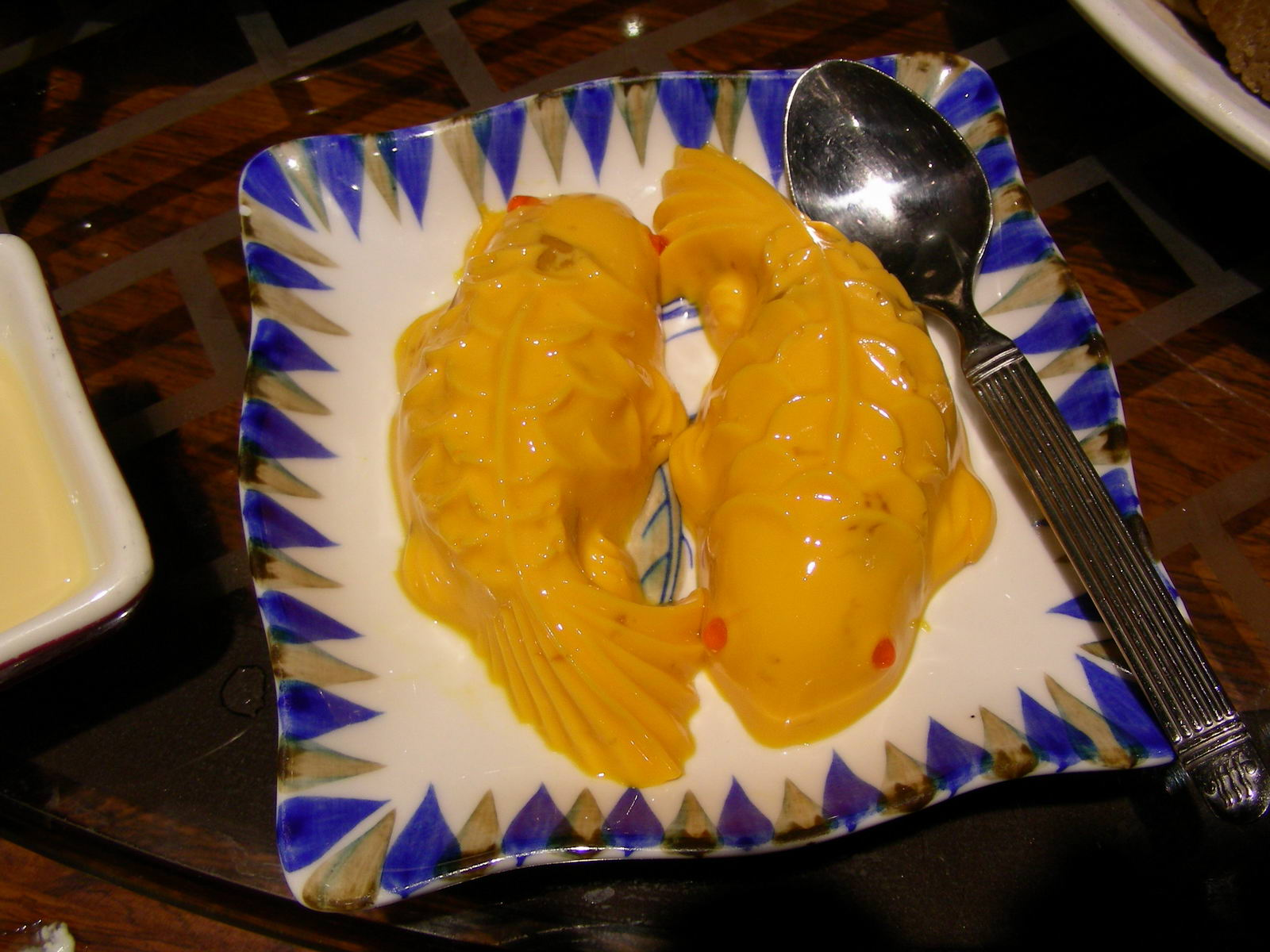 Chinese mango pudding